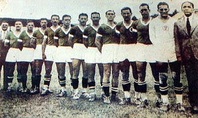 Palestra Itália (Antiga denominação da Sociedade Esportiva Palmeiras) Campeão Paulista de 1940